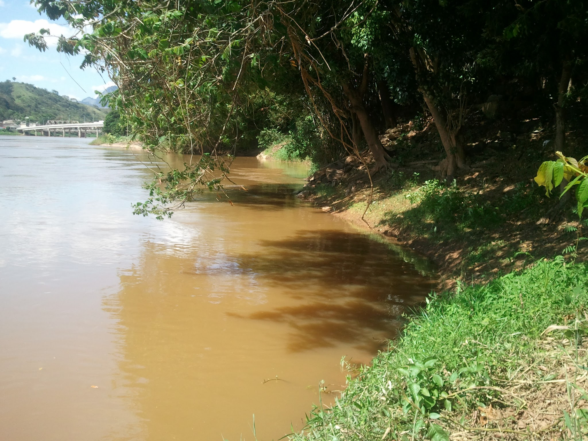 São Fidélis, RJ, Brazil